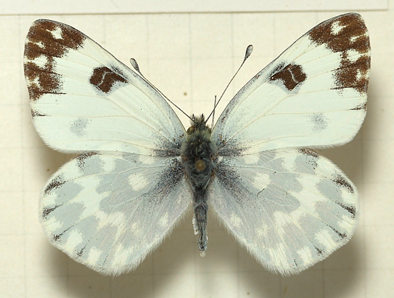 Pontia daplidice, male